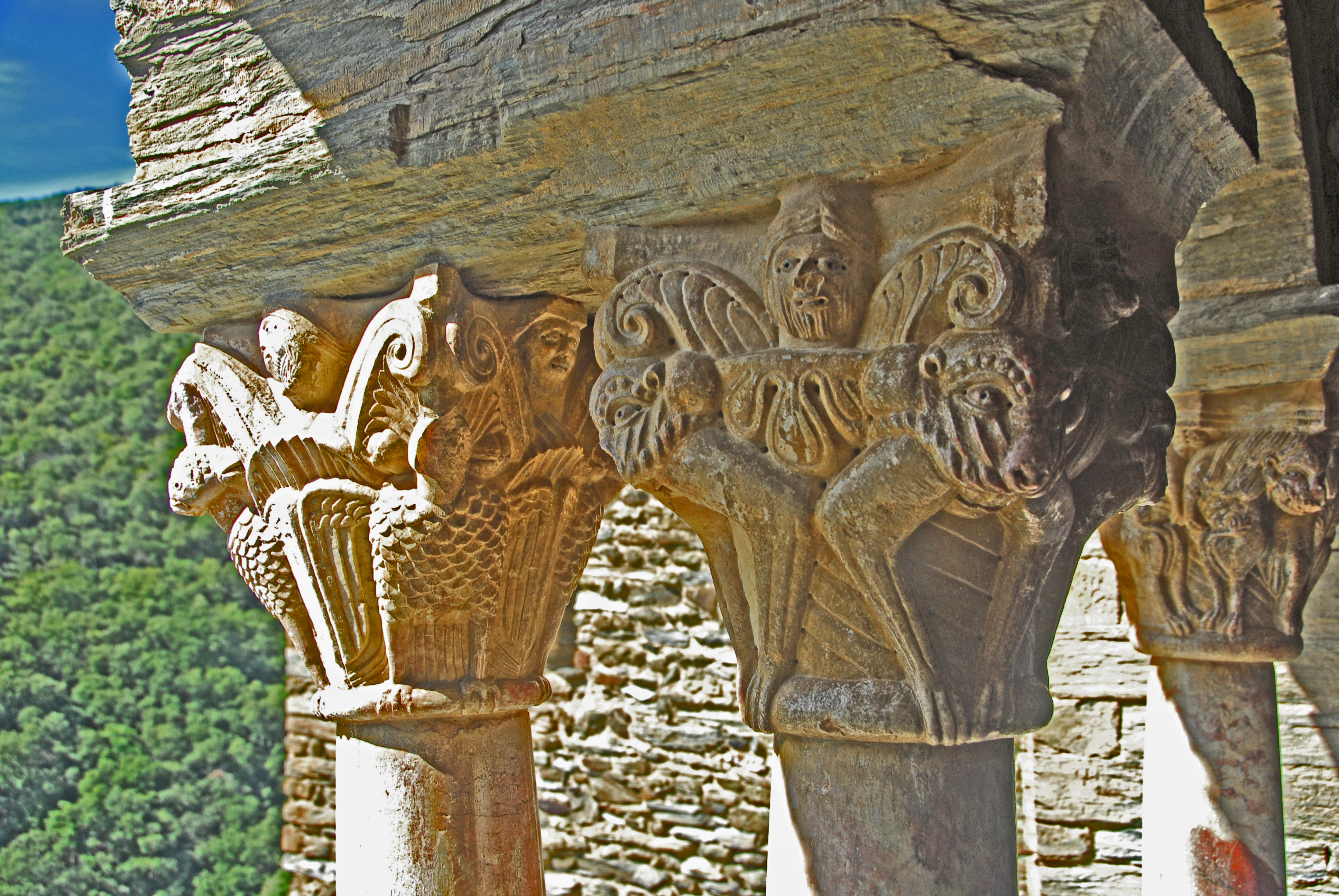 Serrabone, Kreuzgang, Kapitell Nr. 4+3